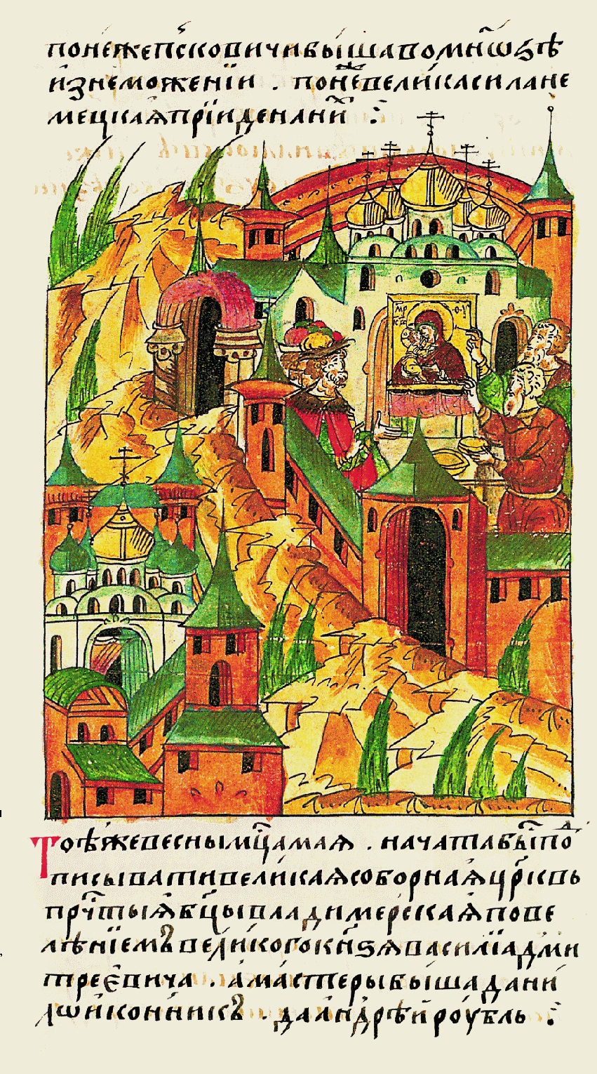 В ту же весну ме- сяца мая начали расписывать великую соборную церковь Пречистой Богородицы Влади- мирской по повеле- нию великого князя Василия Дмитриевича, мастерами были Да- ниил Иконник и Ан- дрей Рублев.